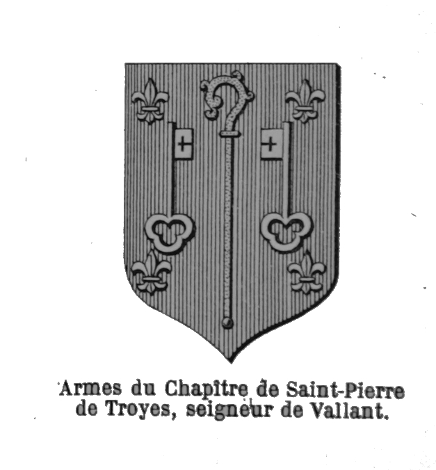 blason du chapitre saint pierre